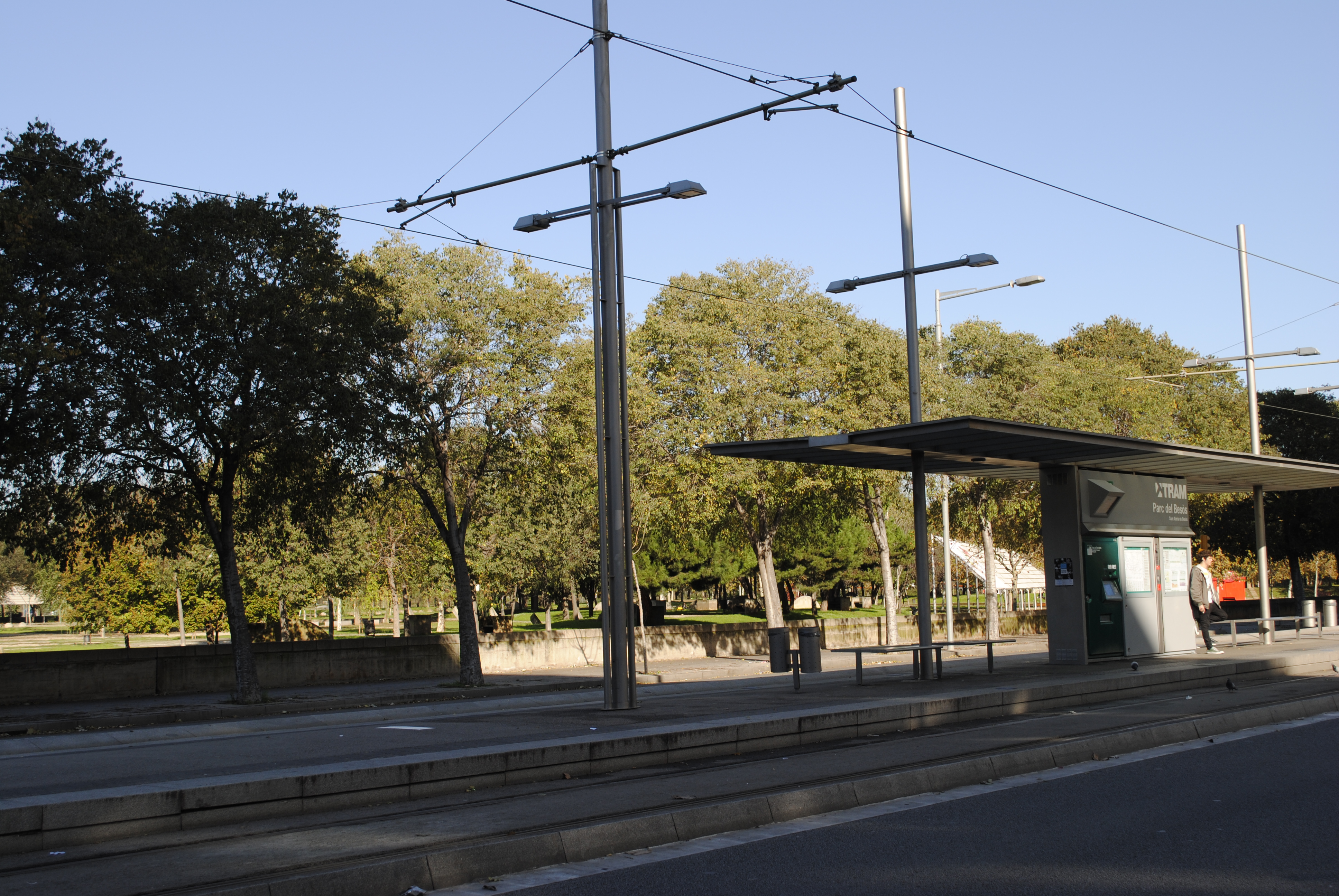 Estació Trambesòs Parc del Besòs